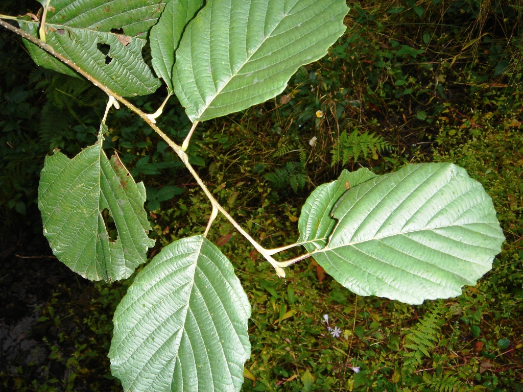 Alnus glutinosa subsp. barbata